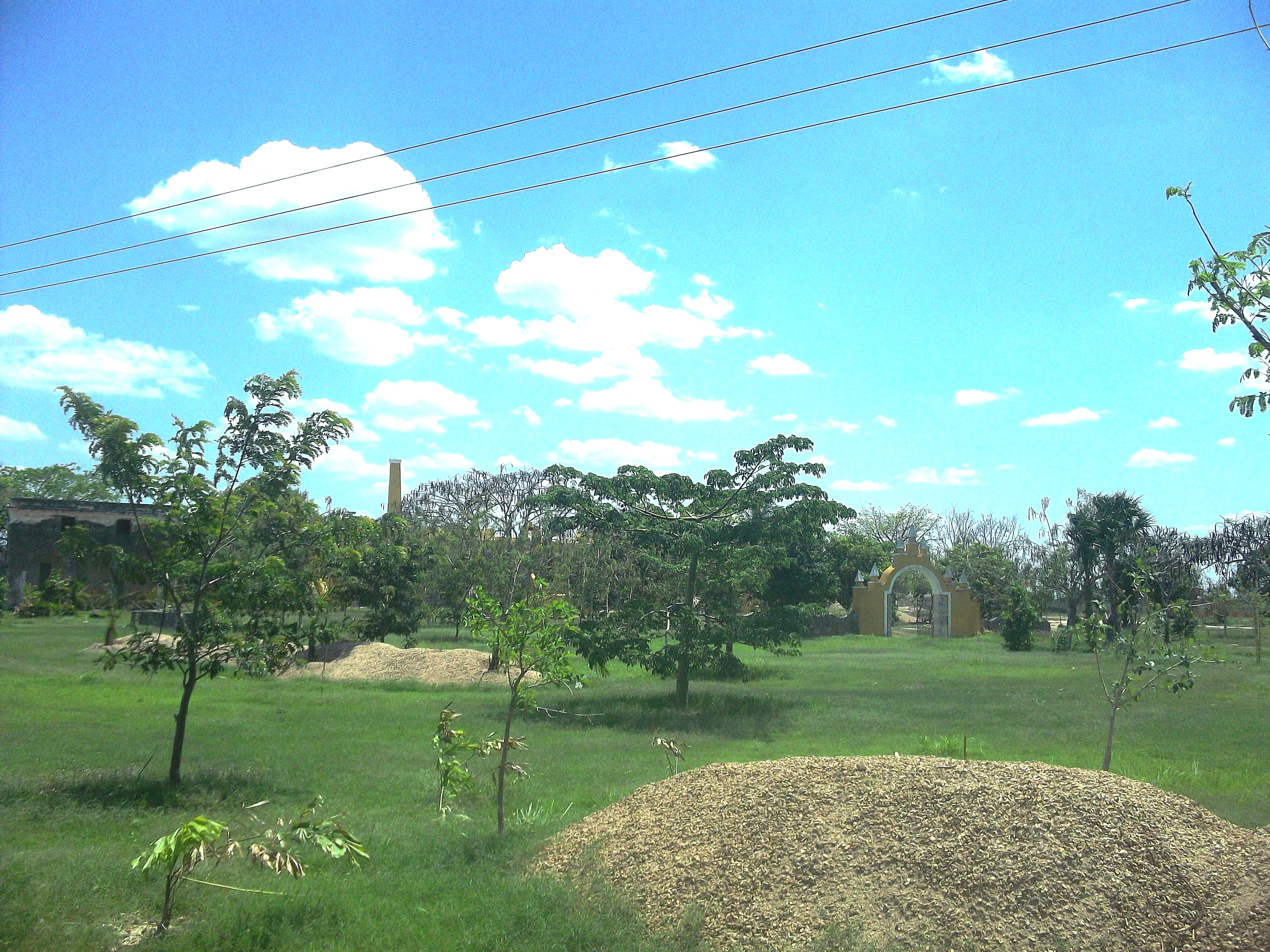 Quinta El Albero en, Mérida, Yucatán.